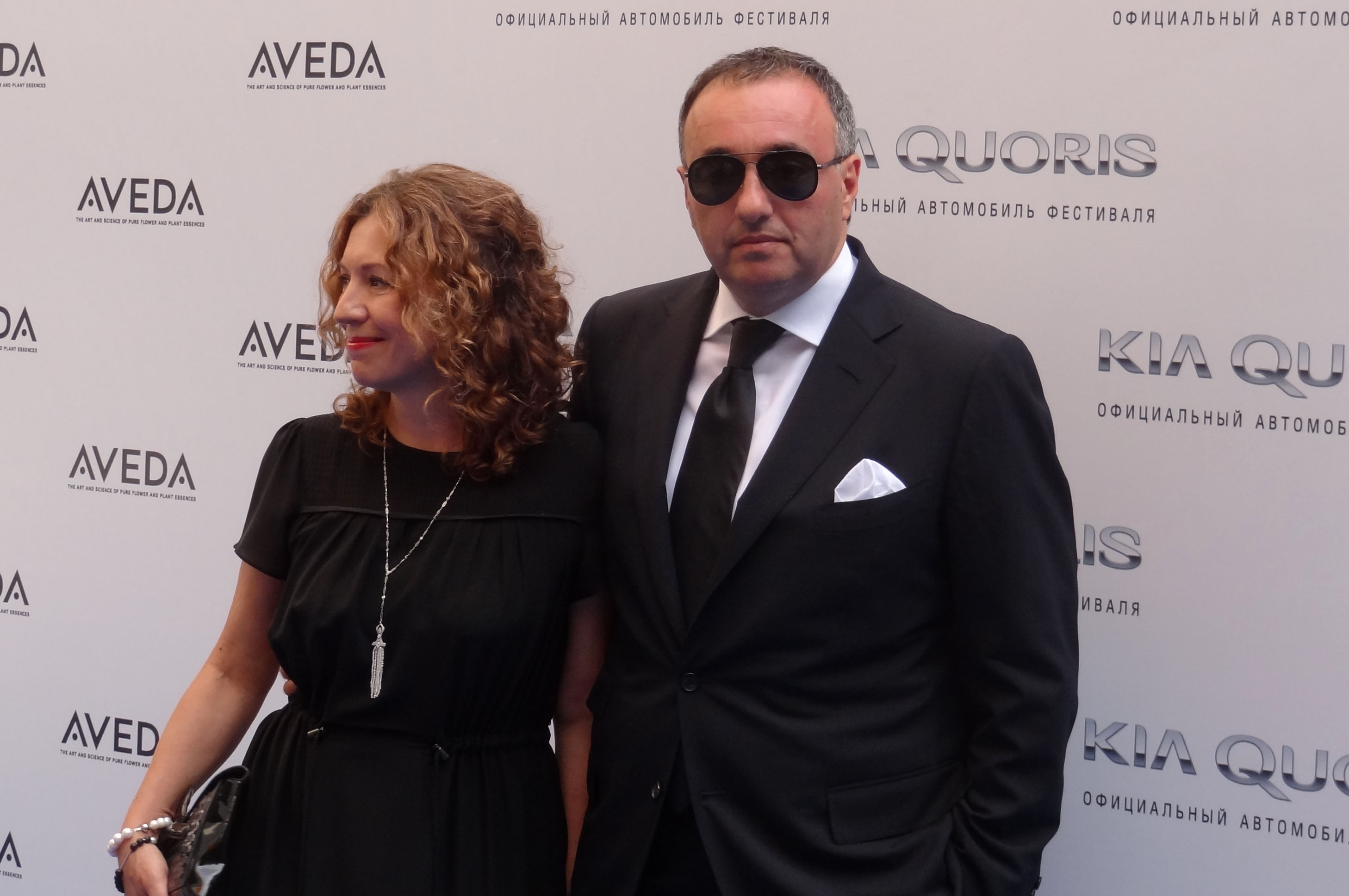 Александр Роднянский с супругой на кинофестивале Кинотавр в Сочи, 2013 г.